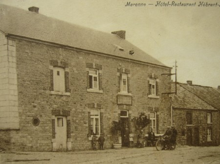 L'Hôtel-Restaurant HEBRANT situé rue du Centre à Marenne